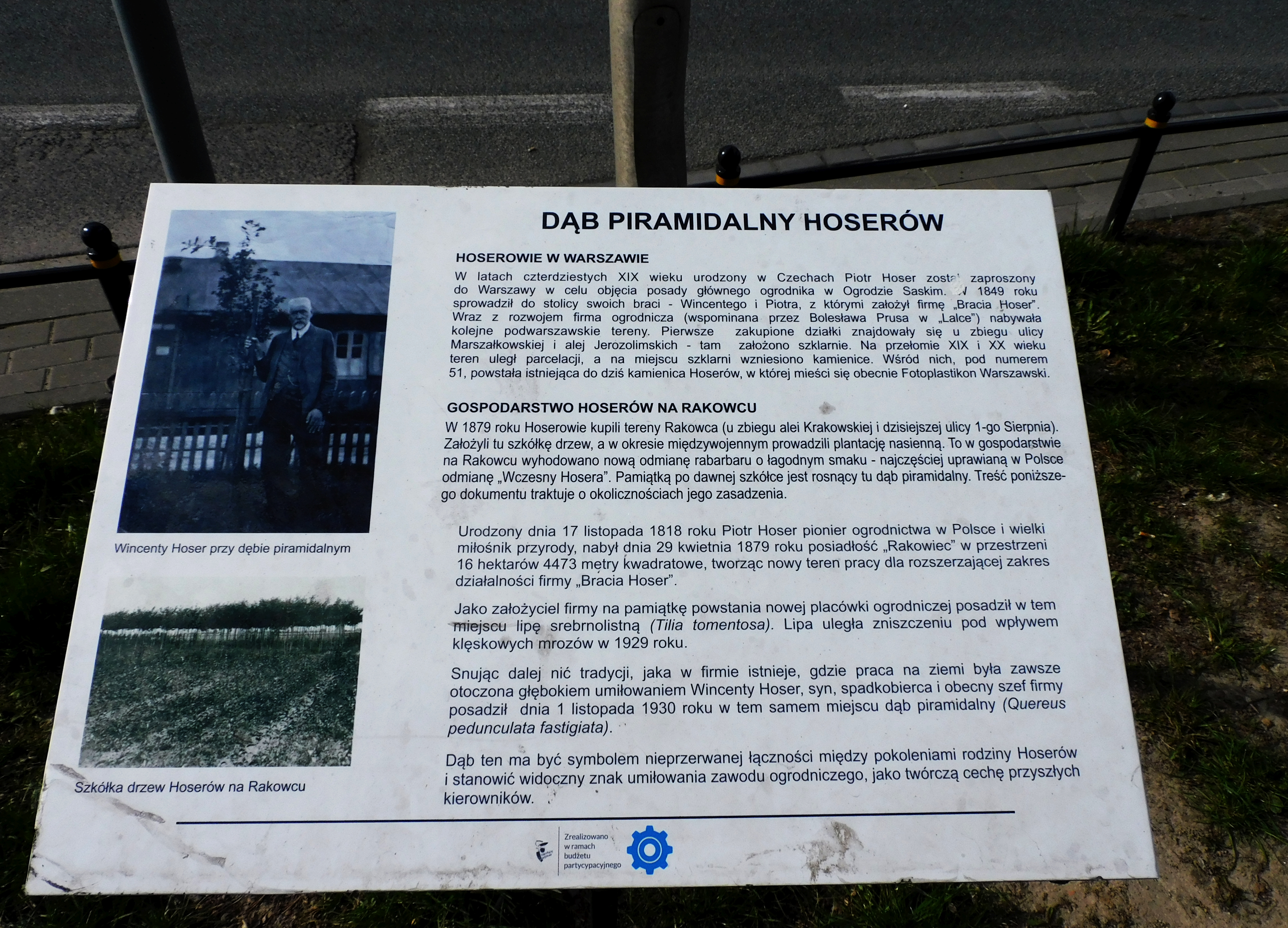 Dom piramidalny ze szkółki Hoserów na warszawskim Rakowcu